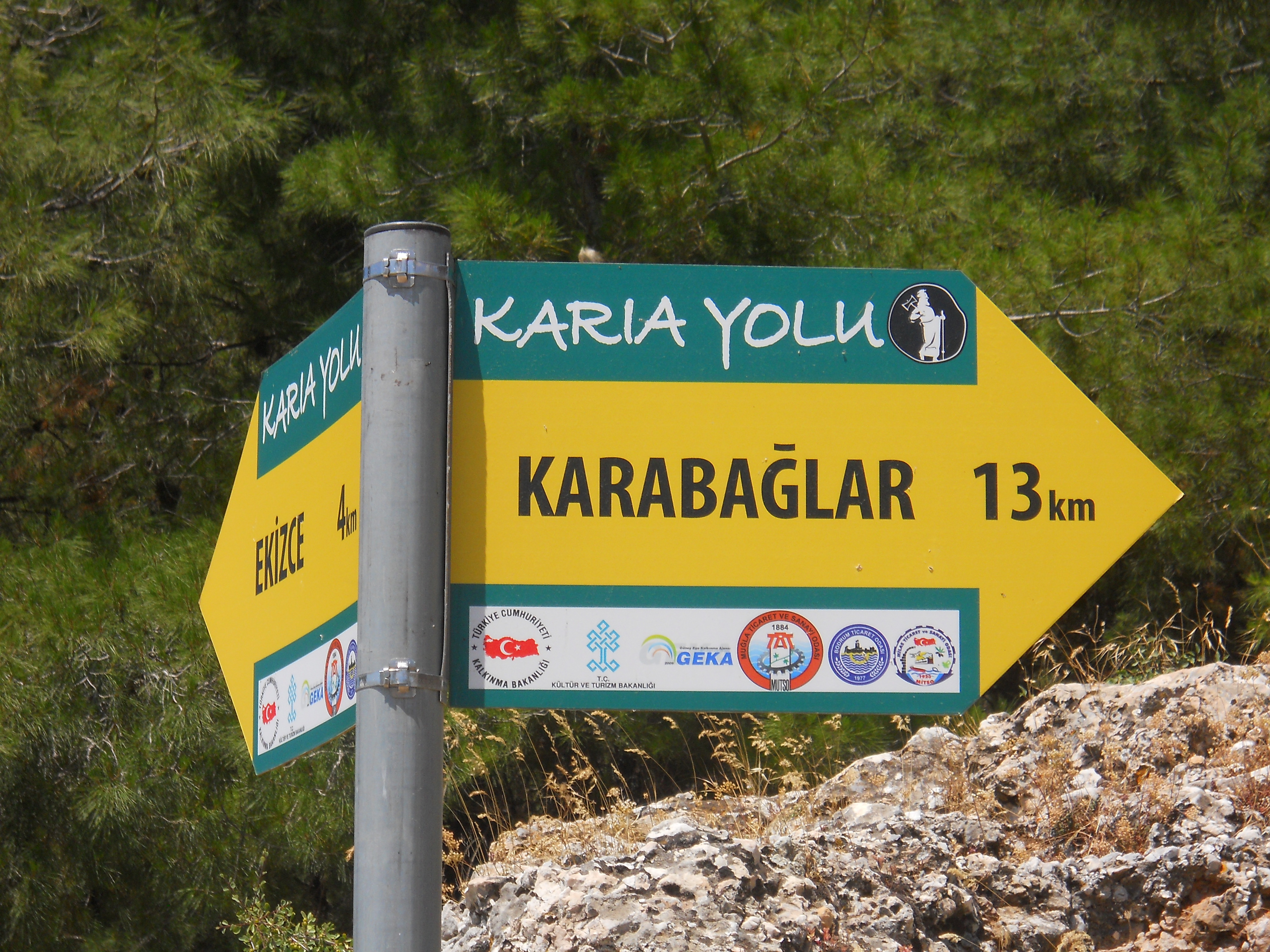 Muğla'da antik Karia yolu üzerinde Karabağlar mahallesini (Yayla) gösteren bir tabela